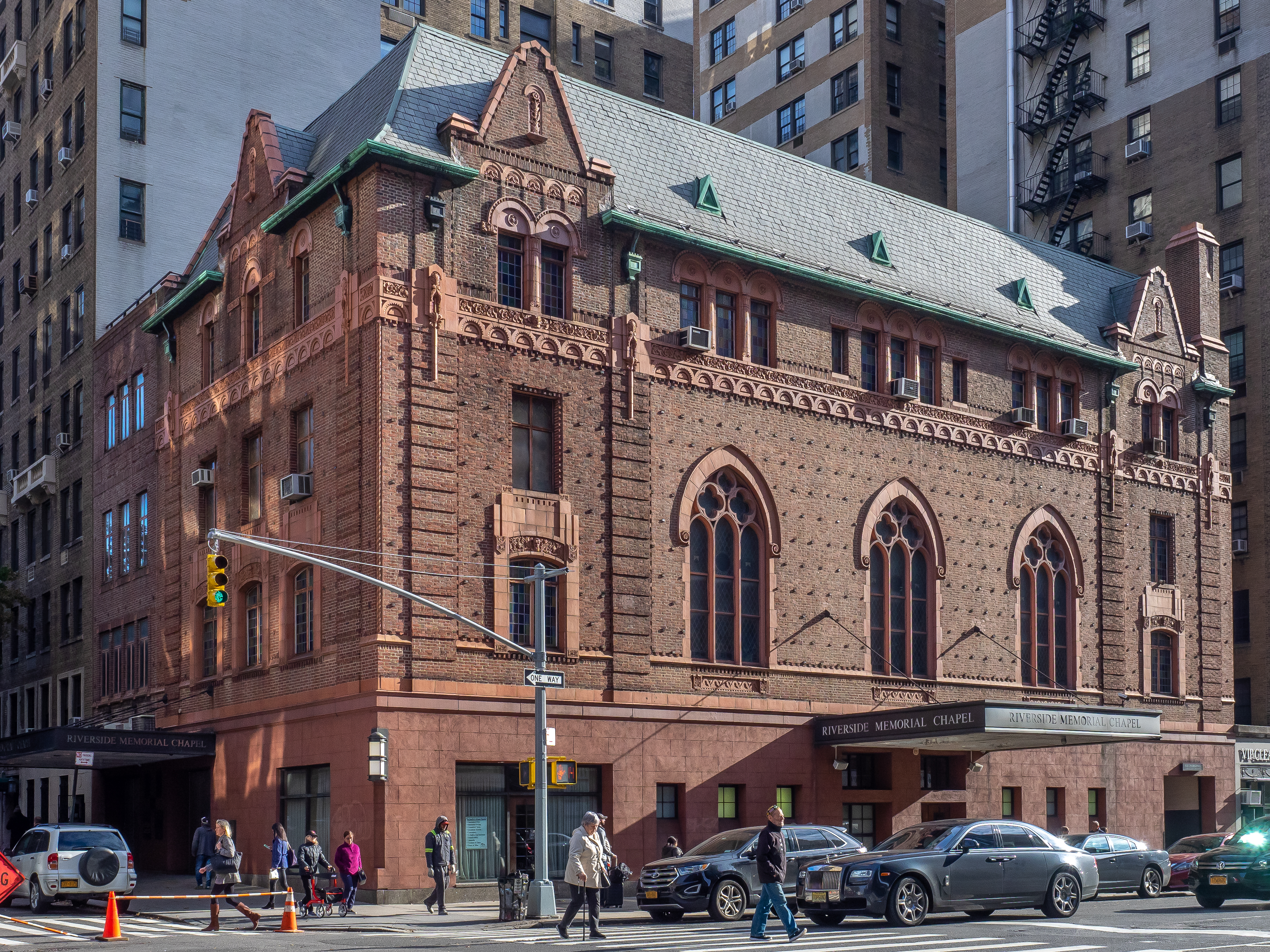 Upper West Side